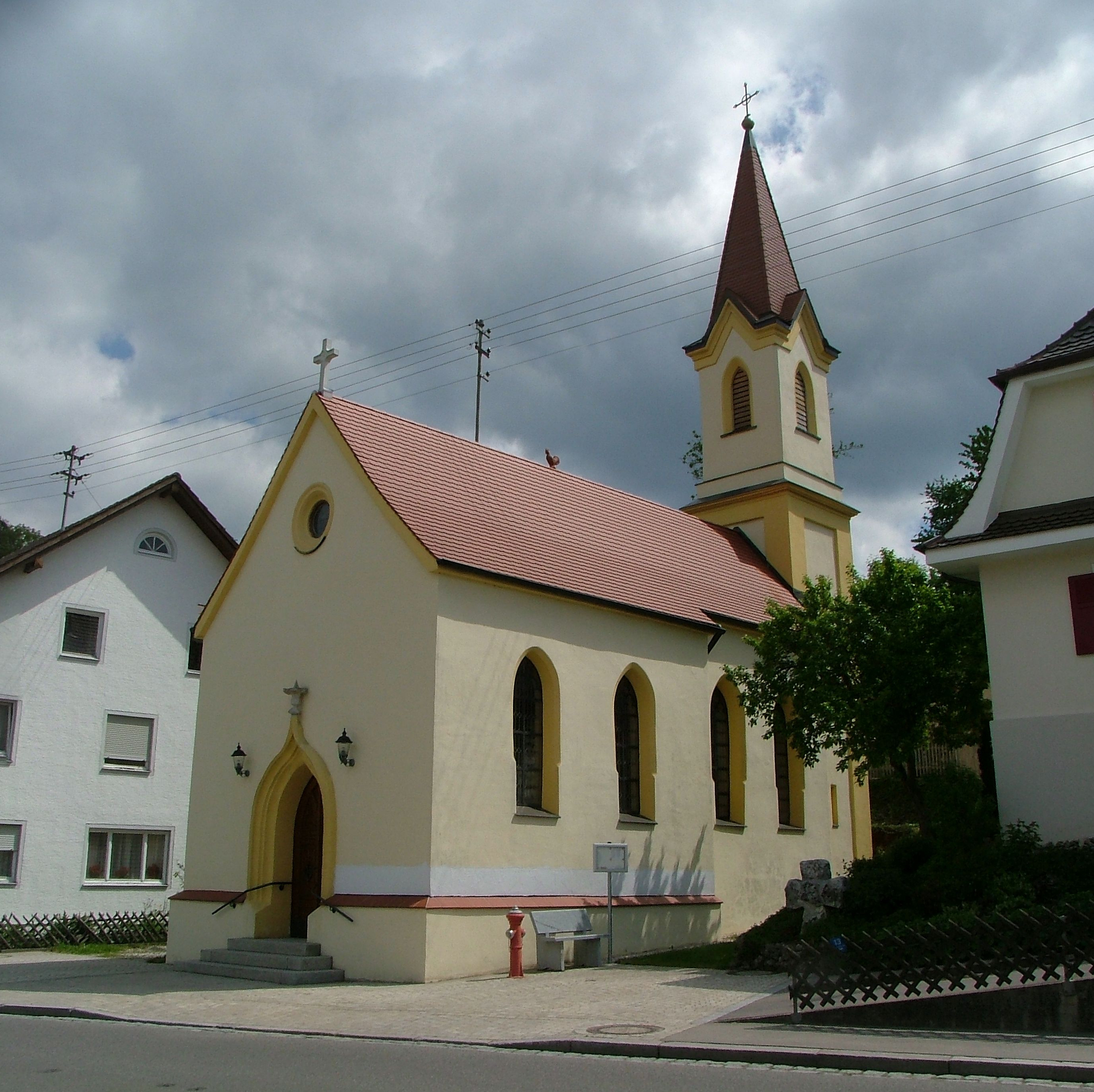 St.Leonhard